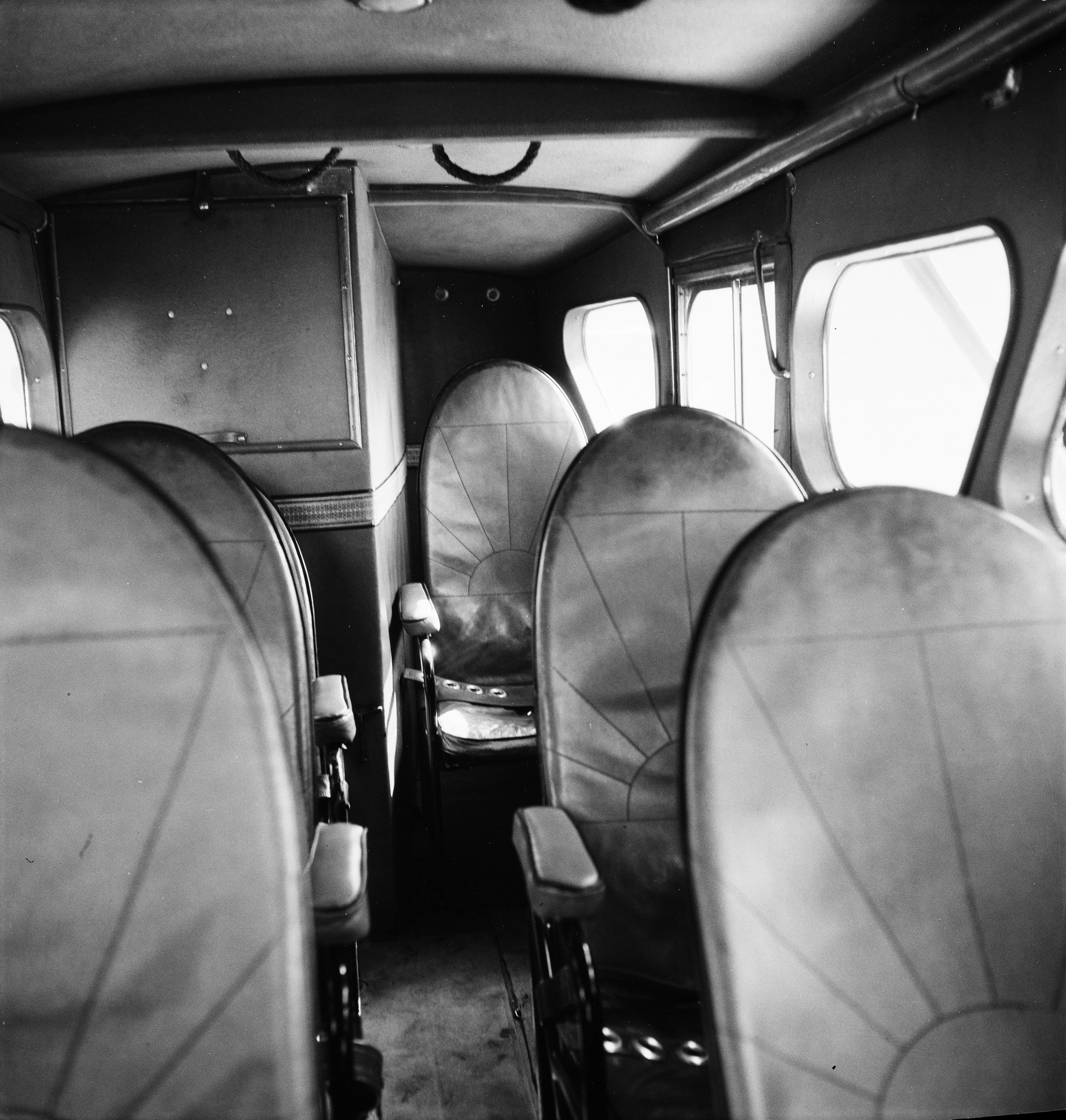 Kabine Dragon Rapide Swissair